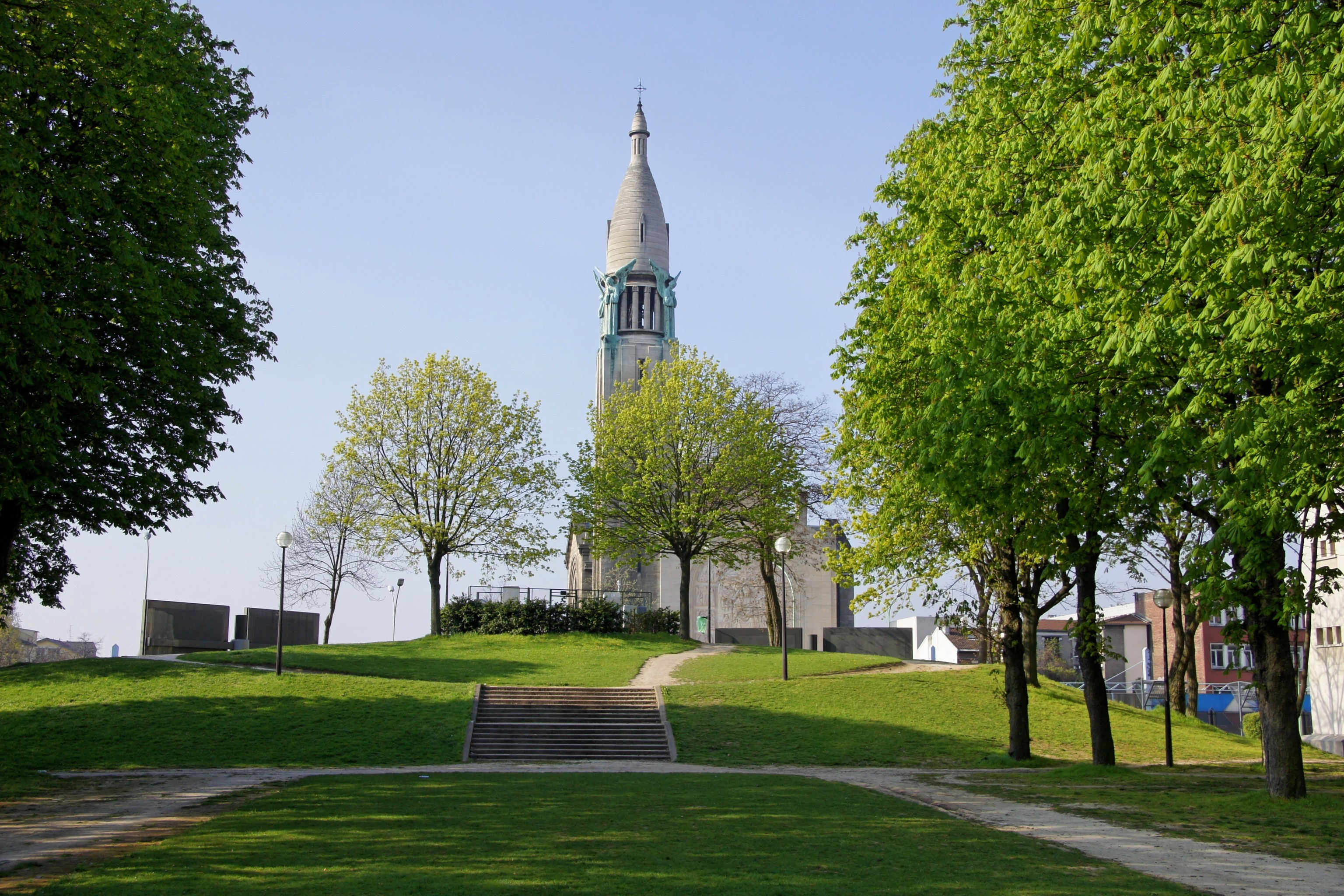 Eglise du Sacré Coeur de Gentilly (92) vue de la cité universitaire. "Cette église fut édifiée pour maintenir une activité spirituelle chez les étudiants de la Cité Universitaire. La construction du boulevard périphérique en 1960 la sépara de la cité universitaire, et les étudiants catholiques la délaissèrent en 1968. Son affectation au culte a été donné en 1979 à la communauté catholique portugaise."